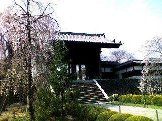 Tougou-ji(Temple)